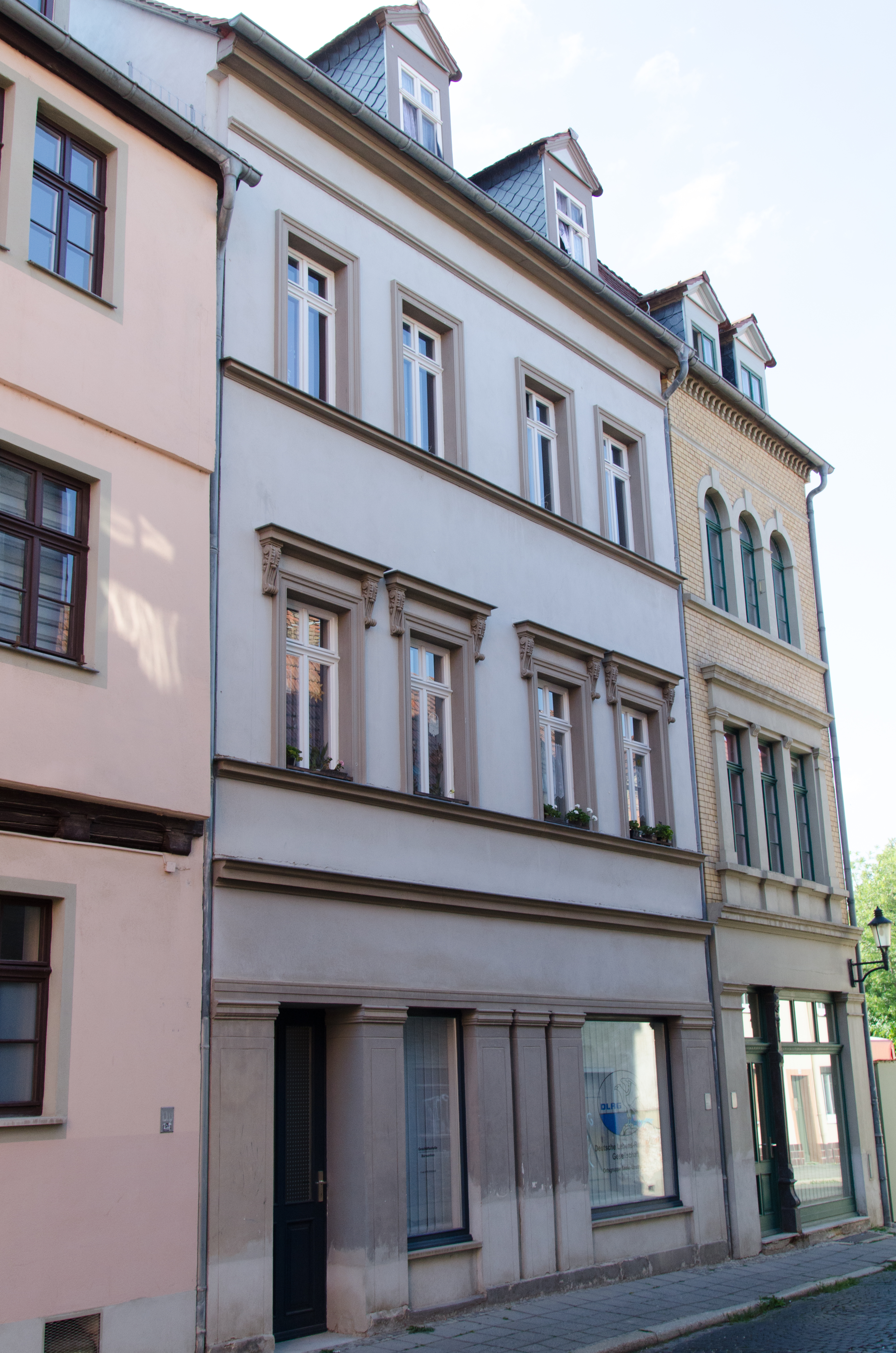 Naumburg, Mühlgasse 17